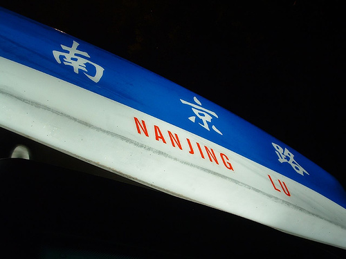 天津的南京路路牌